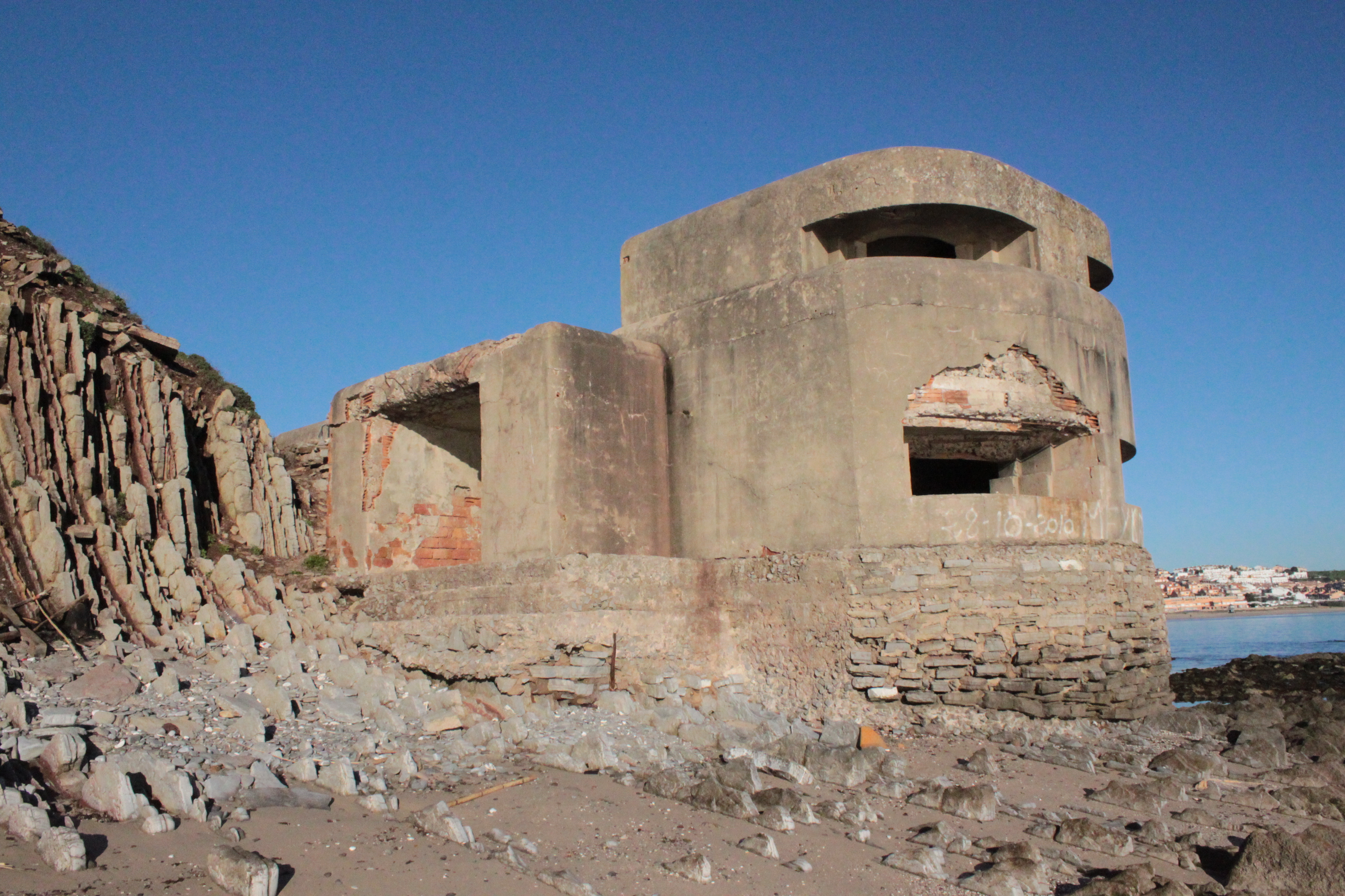 Búnker en la Punta de Getares, Algeciras, Andalucía, España.